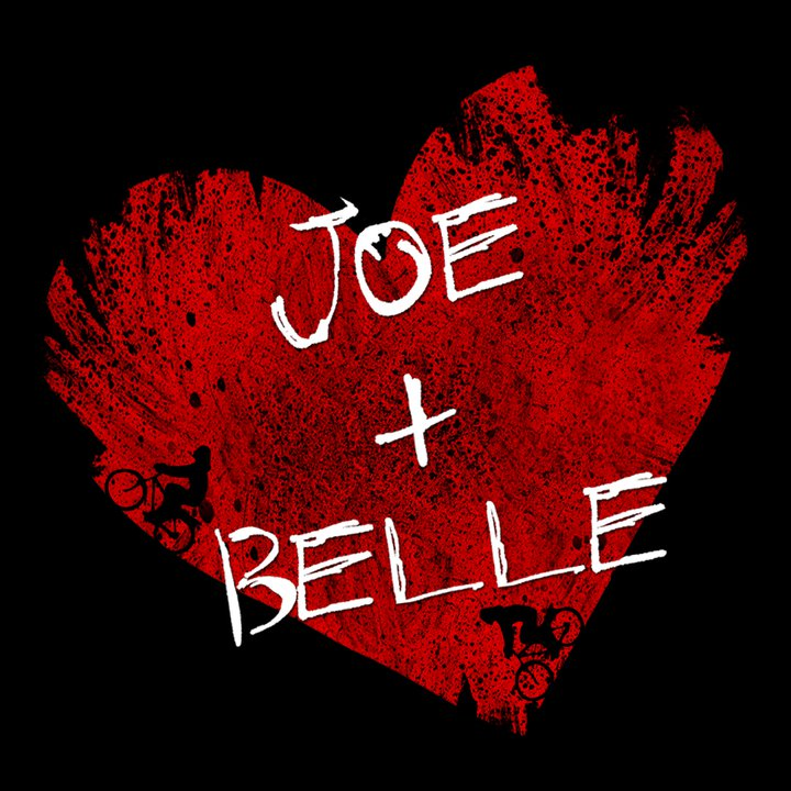 לוגו הסרט ג'ו + בל